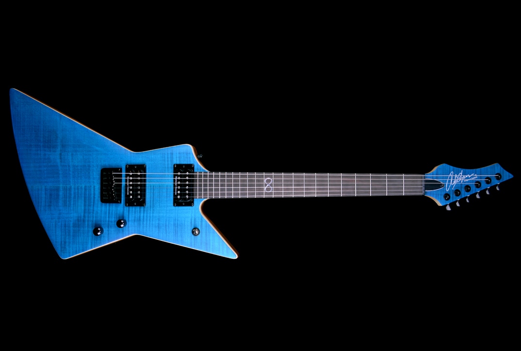 Ghost Fret en acabat blau mat.